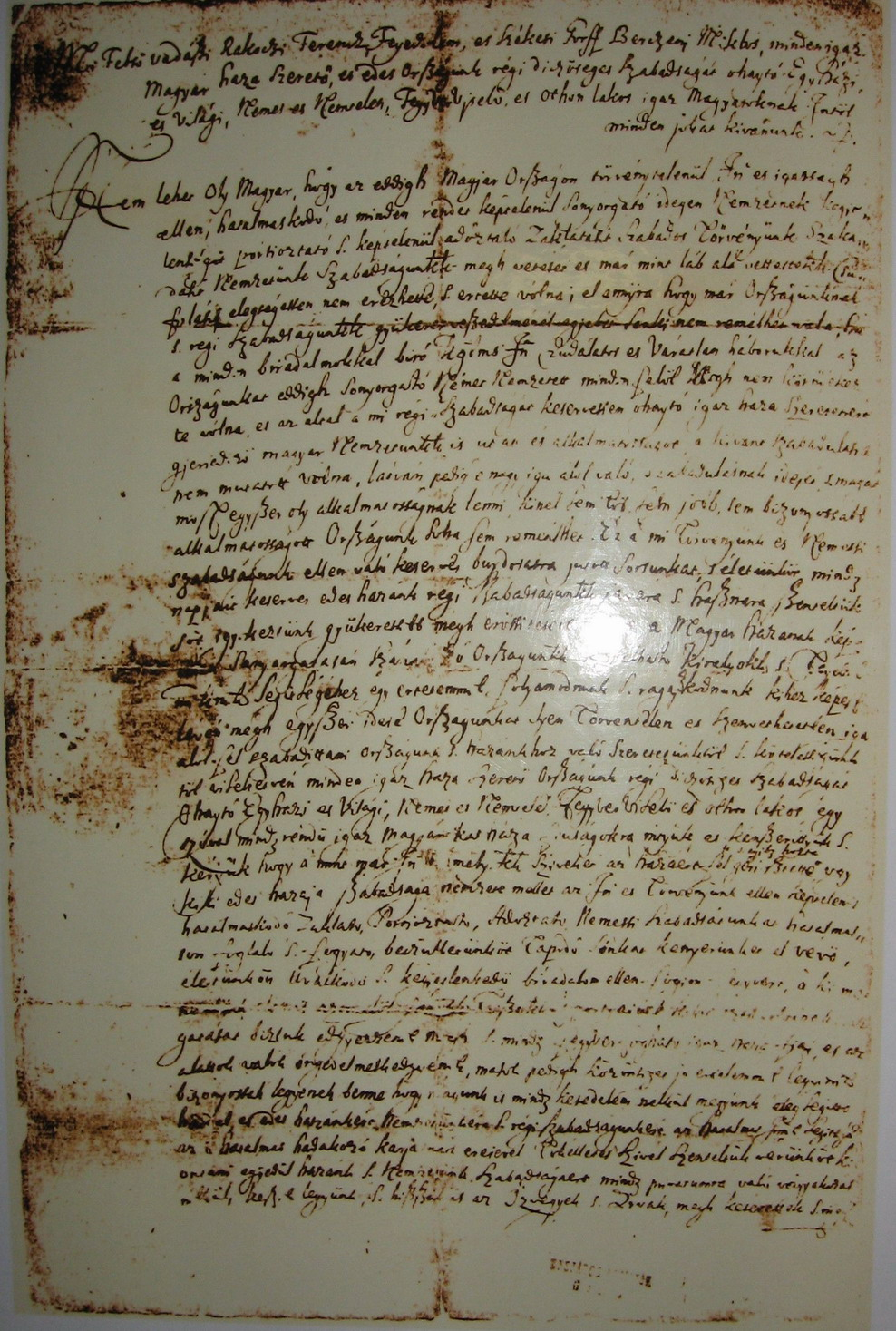 Rákóczi brezáni kiáltványa